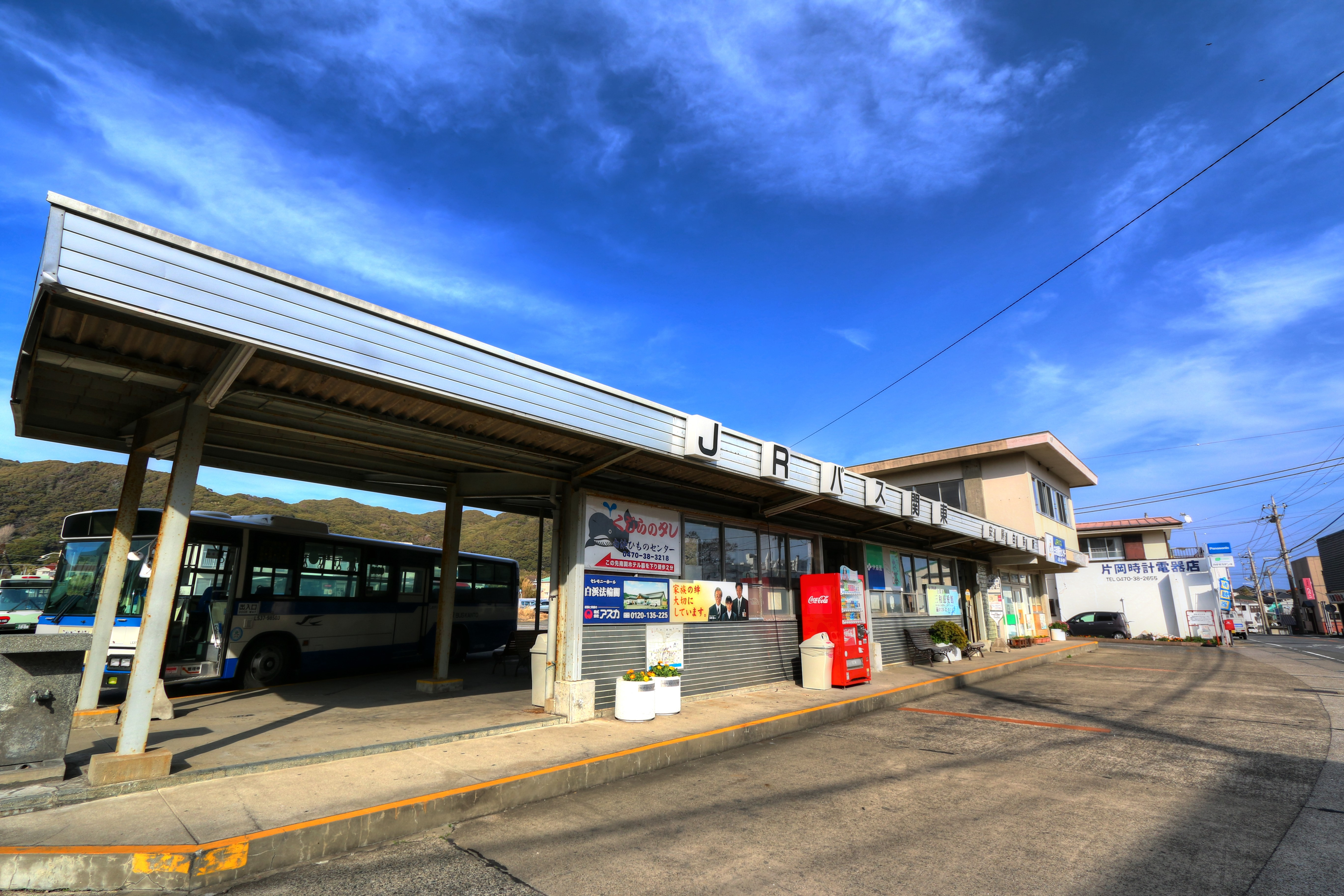 安房白浜駅